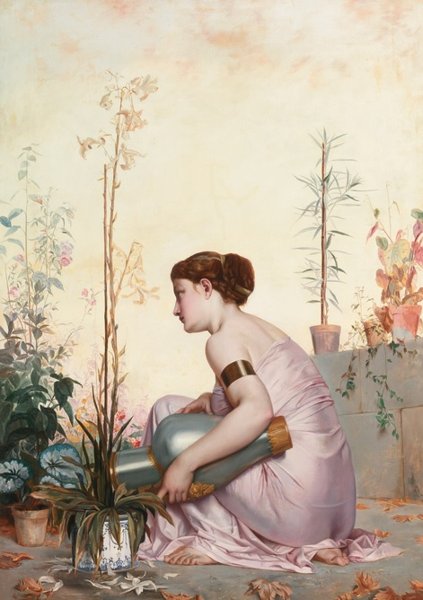 Adolphe-Alexandre Lesrel, Figure, collection particulière